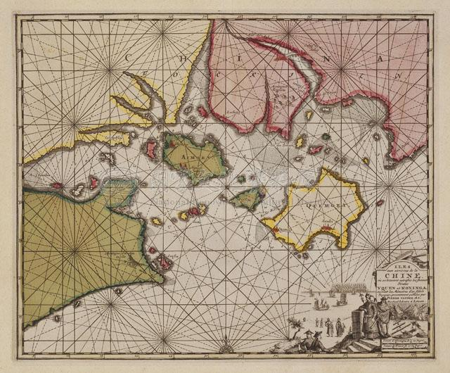 國家文化資料庫 系統識別號 0005628889 作品類型 古地圖 原件與否 原件 藏品層次 單件 媒體類型 數位檔案 數量單位 1 尺寸大小 外框48.5 cm(W)x38.2 cm(H)； 圖幅35.2 cm(W)x29 cm(H) 色彩模式 RGB,RGB 壓縮比 ,1：0.75 圖片大小 ,640x530pixels 每點位元素 彩色-每像素24-bits,彩色-每像素24-bits 作品名稱 主要題名 ：Iles aux environs de la Chine ou se tenoient autrefois les fameux pirates Yquen et Koxinga 內容主題 Iles aux environs de la Chine ou se tenoient autrefois les fameux pirates Yquen et Koxinga 關鍵詞 鄭成功,鄭芝龍 圖說 本圖為荷蘭萊登市人Pieter van der Aa所製的海圖，主要描寫大海盜鄭芝龍一官（Yquen）與鄭成功國姓爺（Koxinga）的基地：金門與廈門一帶地區。比例尺為德里與法里。紅色部分應為泉州府轄區，黃色為漳州府（Cincheu）轄區。在廈門（Aimoey）對岸則標示了鼓浪嶼（Colonghsou），漳州河（Chincheu R.），在泉州則標示了安海（Anhay）。金門、廈門（Quemoey）之間則為烈嶼（Lissiou）、大擔島（I. Toatta）。金門島上標示料羅（Lauloi），料羅灣則被荷人命名為伊拉斯穆斯灣（Baie d�� Erasme）。圖上不但標示方位線，同時也標註沙汕和水道深度，在廈門西側標示有數艘帆船，則表示為可泊 碇處。 保存狀況 良好 收藏取得方式 購入 修復記錄 無 編篡/發行者 佚名 出版/發行日期 17世紀 館藏地 國立臺灣歷史博物館 出版/發行地點 不詳 著作財產權人 國立臺灣歷史博物館 著作權授權狀態 〔20041215,〕 使用限制 網際網路公開展示與檢索 典藏單位 本數位作品由國立臺灣歷史博物館及行政院文化建設委員會國家文化資料庫分別典藏